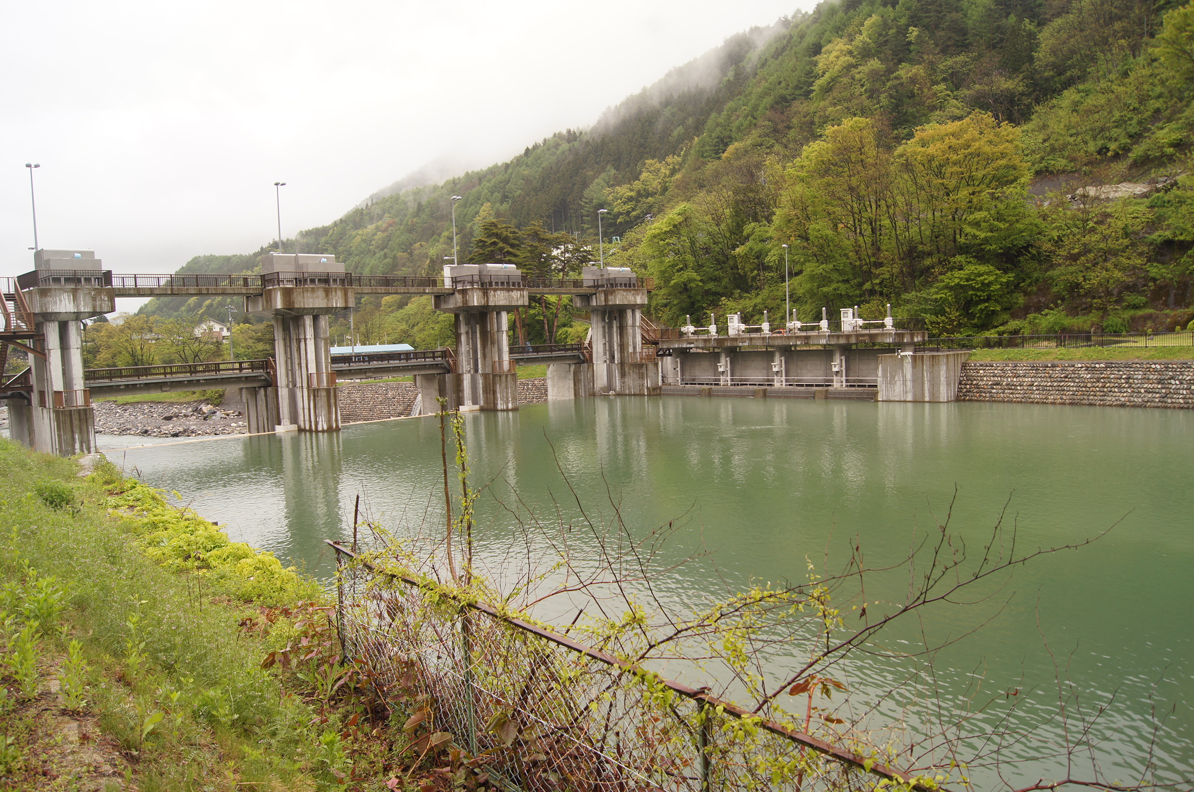 梓川頭首工による梓川の堰止めと取水のようす。左側の大きな水門を過ぎる水は梓川の本流となり、右側4つの取水口から取り入れられた水は、各種の用水となる。